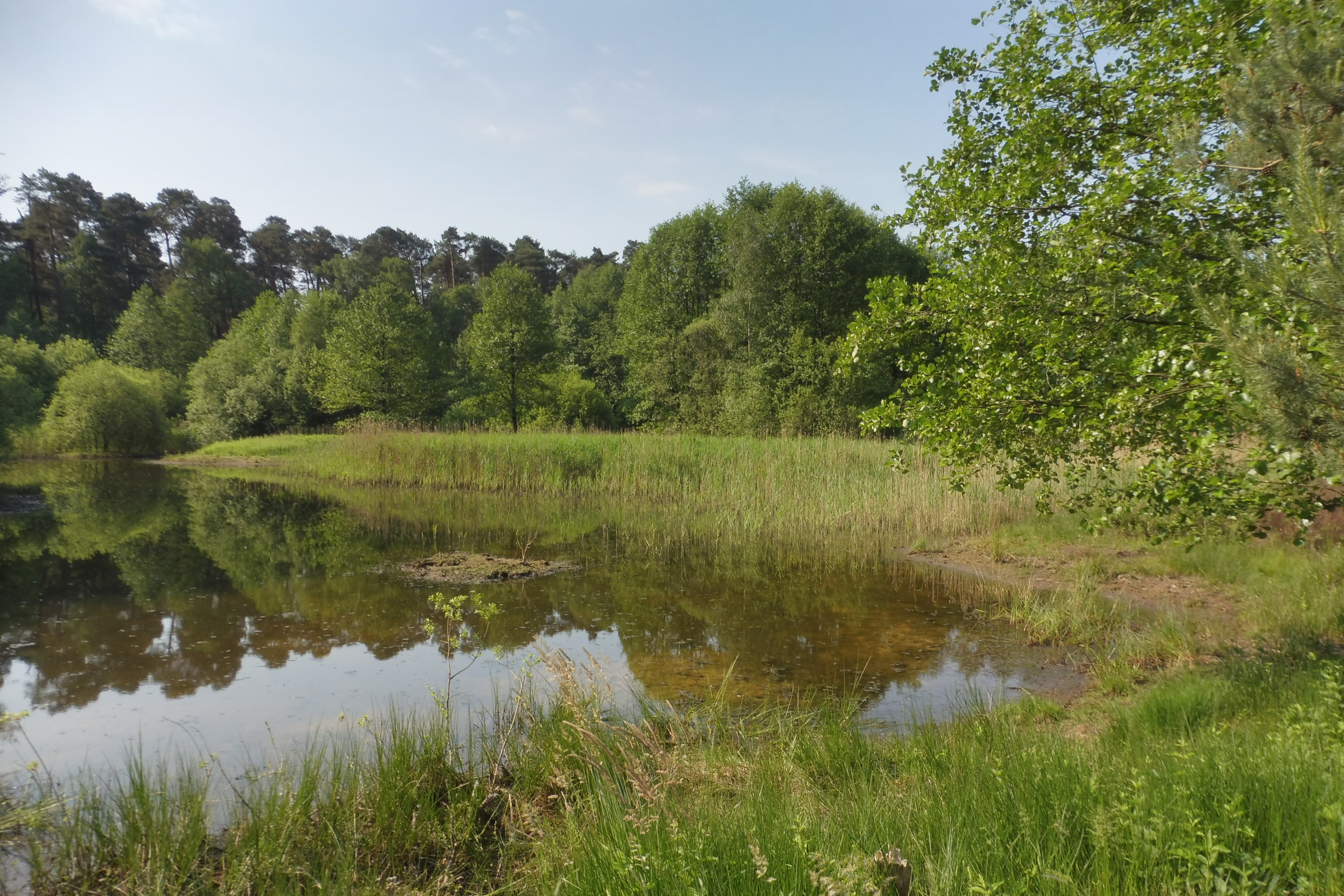 Teich im Ramselbruch (außerhalb des Naturschutzgebietes)